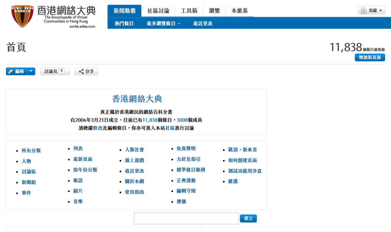 香港網絡大典首頁